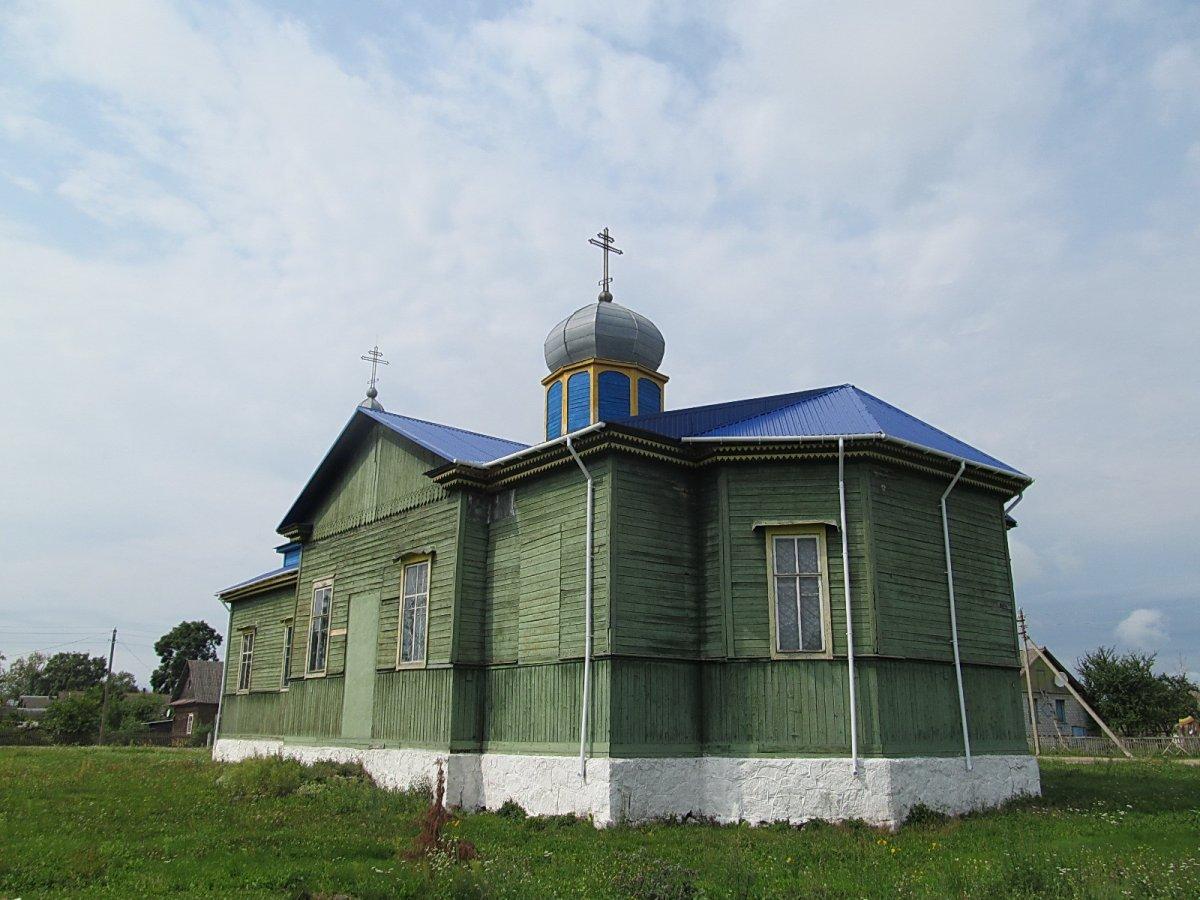 Пераброддзе. Царква